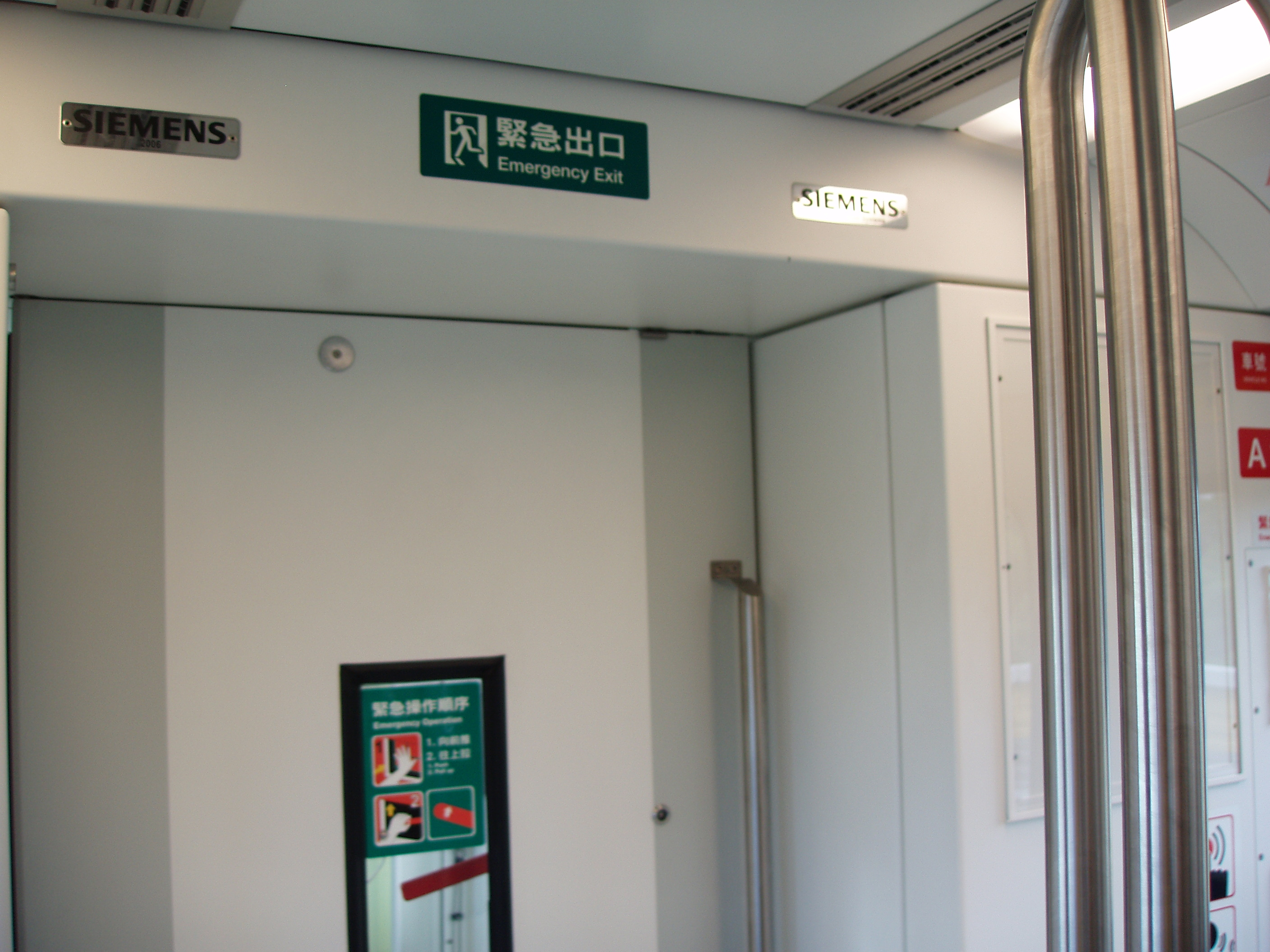 高雄捷運紅線列車緊急出口及出廠銘牌。